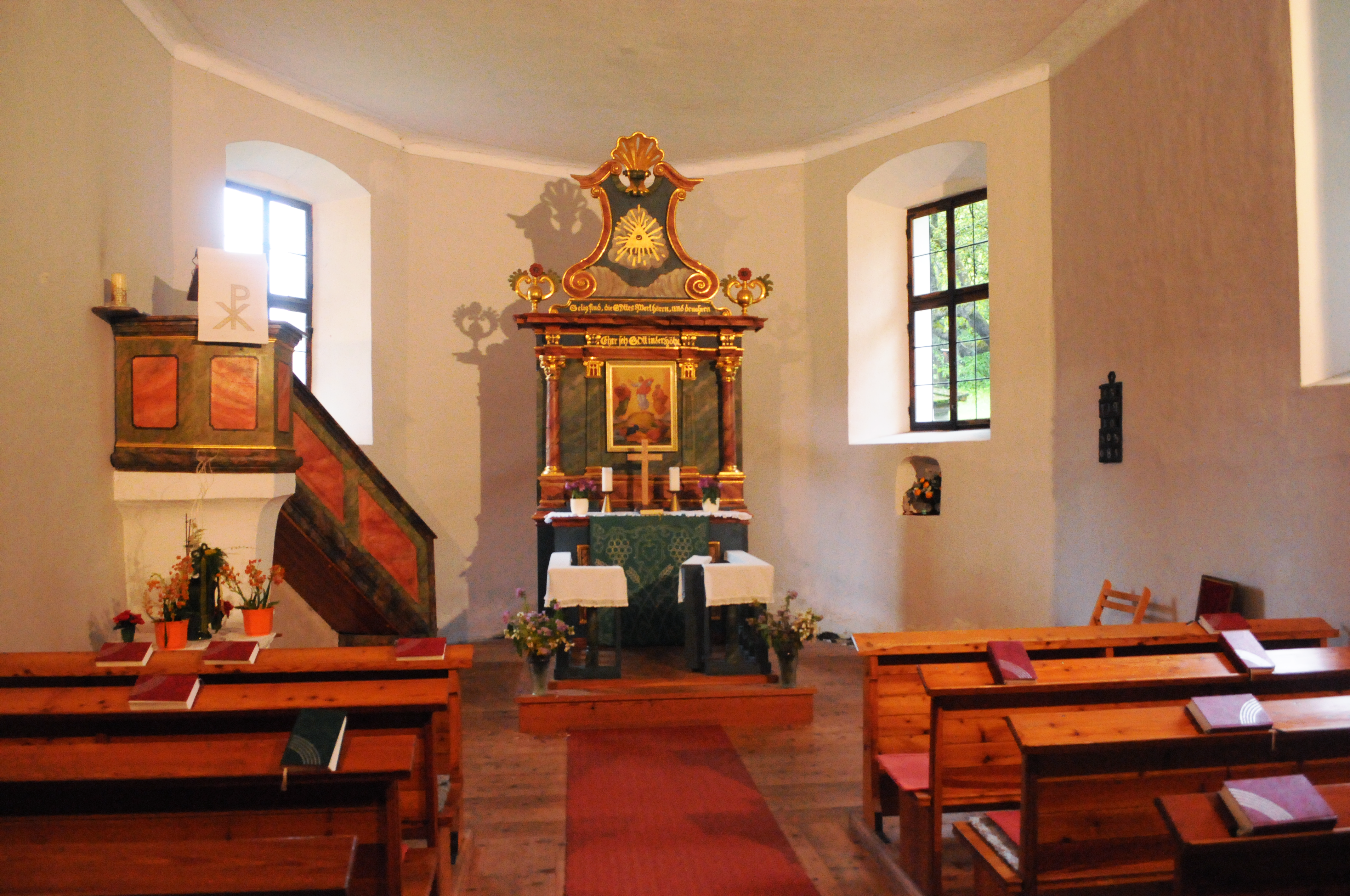 Glaubenskirche in Sankt Johann am Tauern - Innenraum mit Altar, Speisgitter und Kanzel